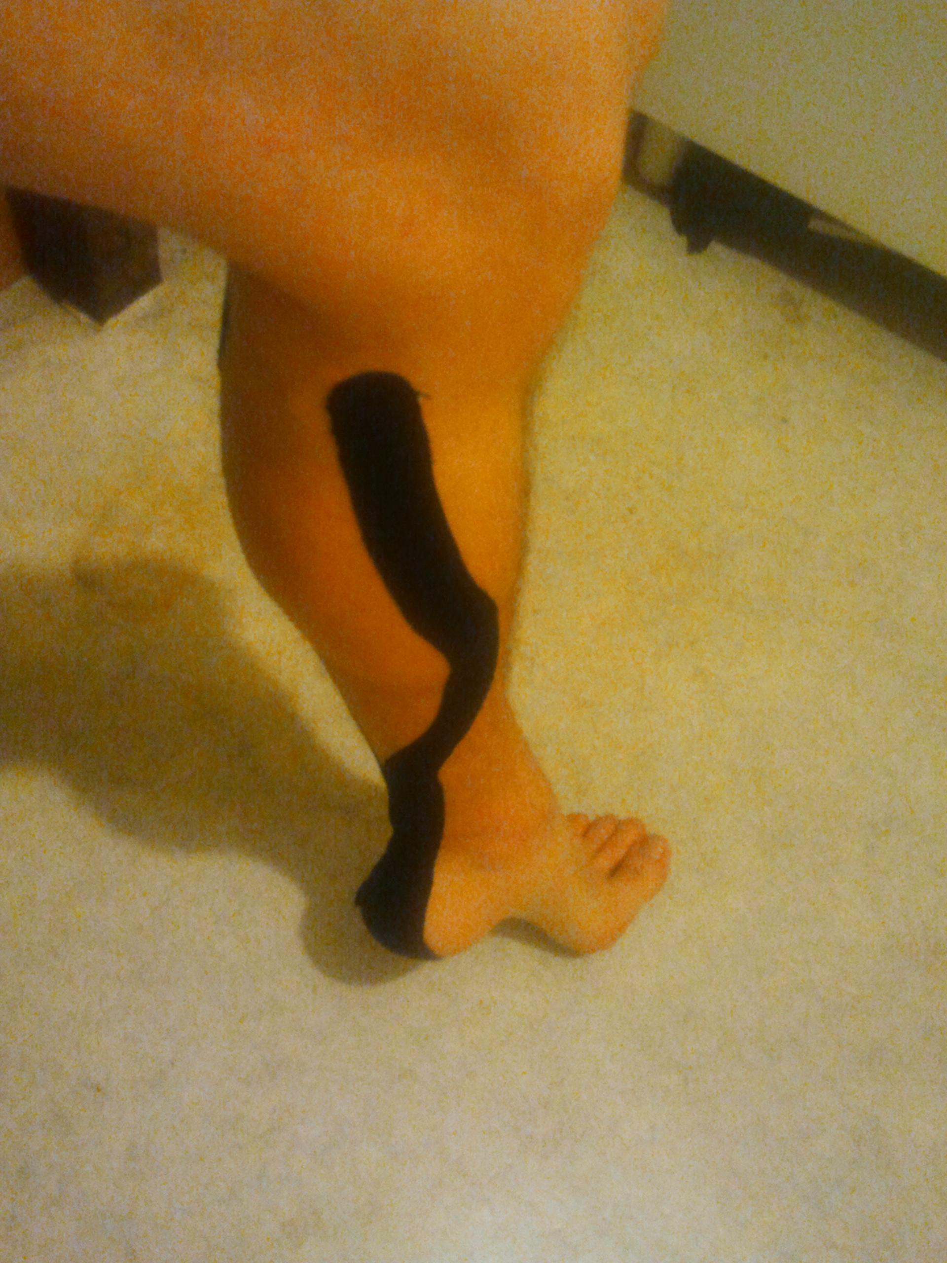 Poltrejdet ganin: ur ginesiotapenn evit gwareziñ ma seul